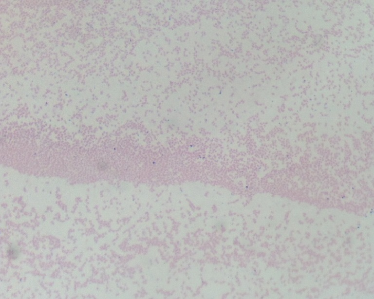 coloration de Gram